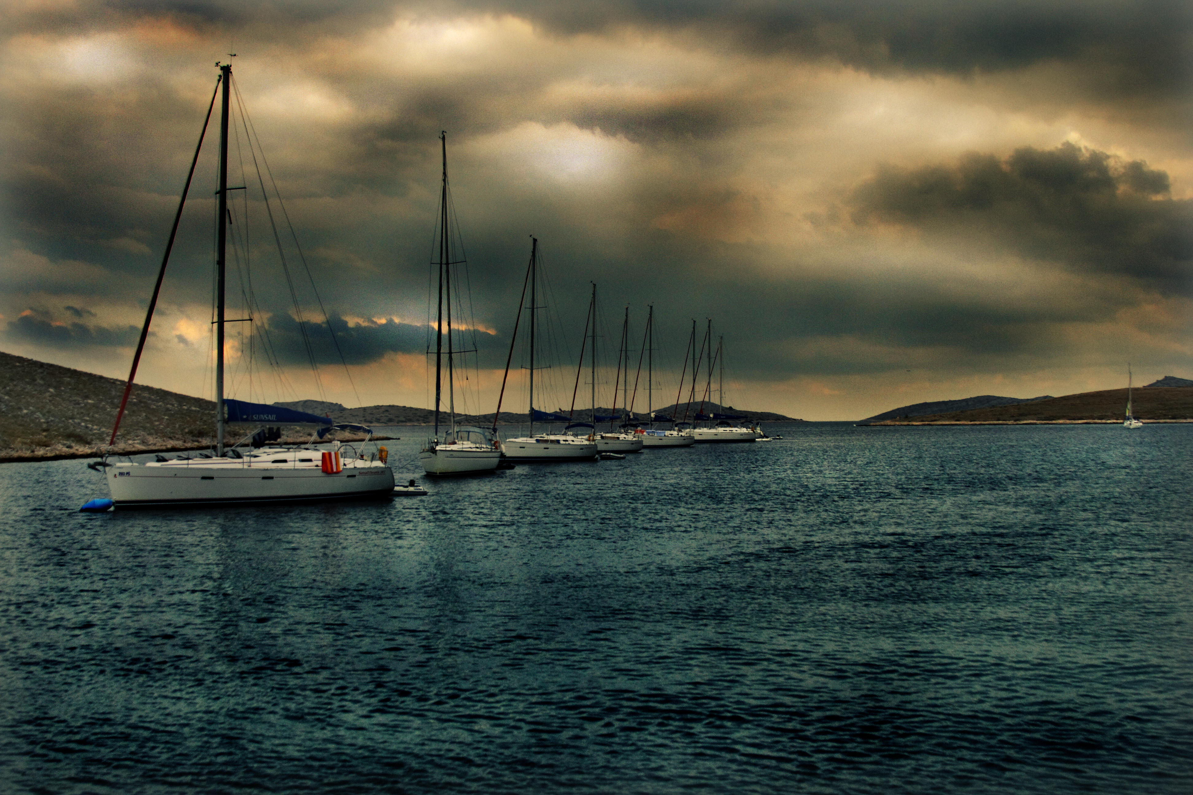 Kornati zaliv Vrulje